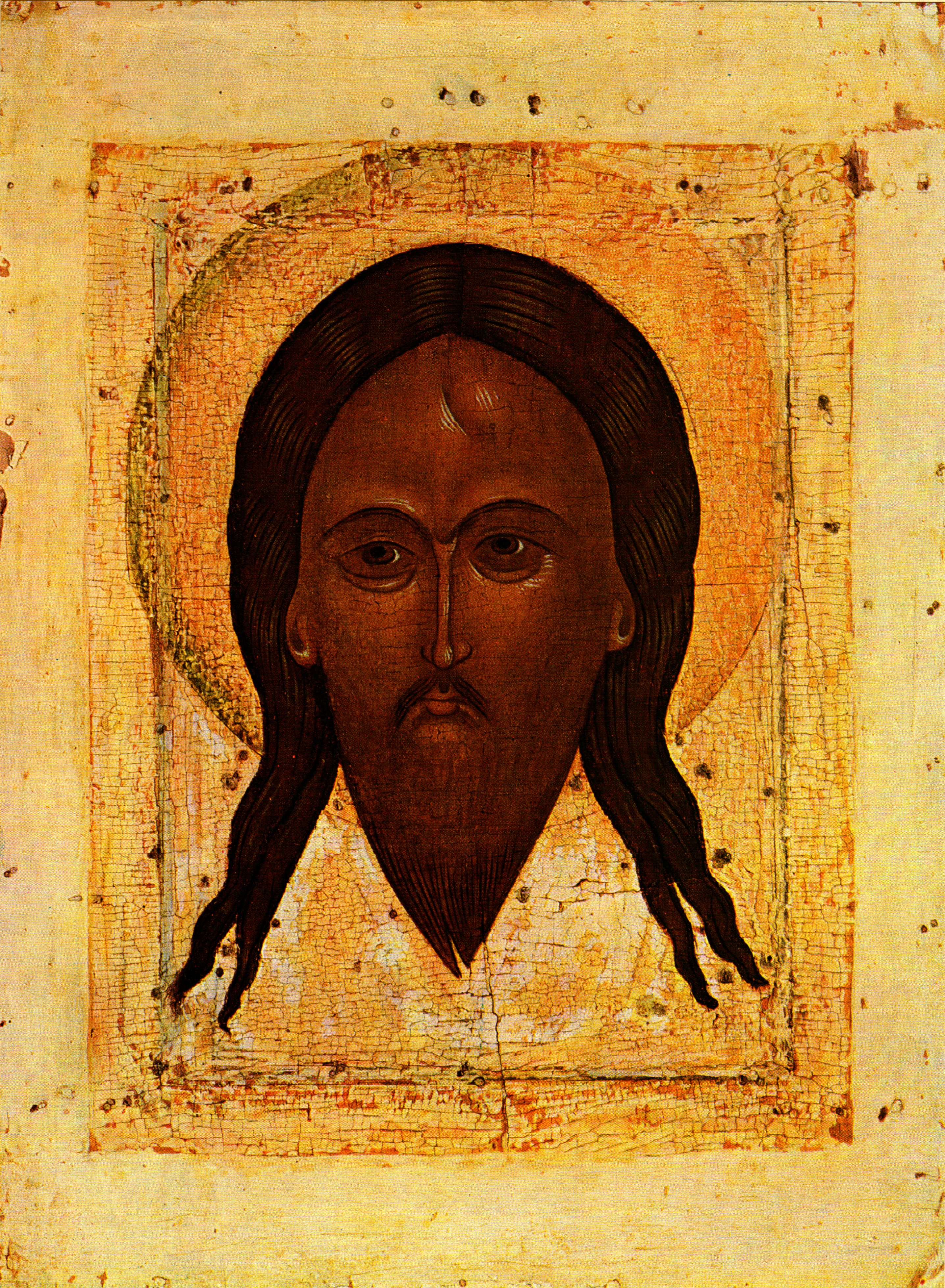 Das nicht von Menschenhand geschaffene Bild Christi (Acheiropoieton)Moskau, Holz, 31 x 23 cmEhem. Staatliche Museen Berlin, Inv.-Nr. 9640